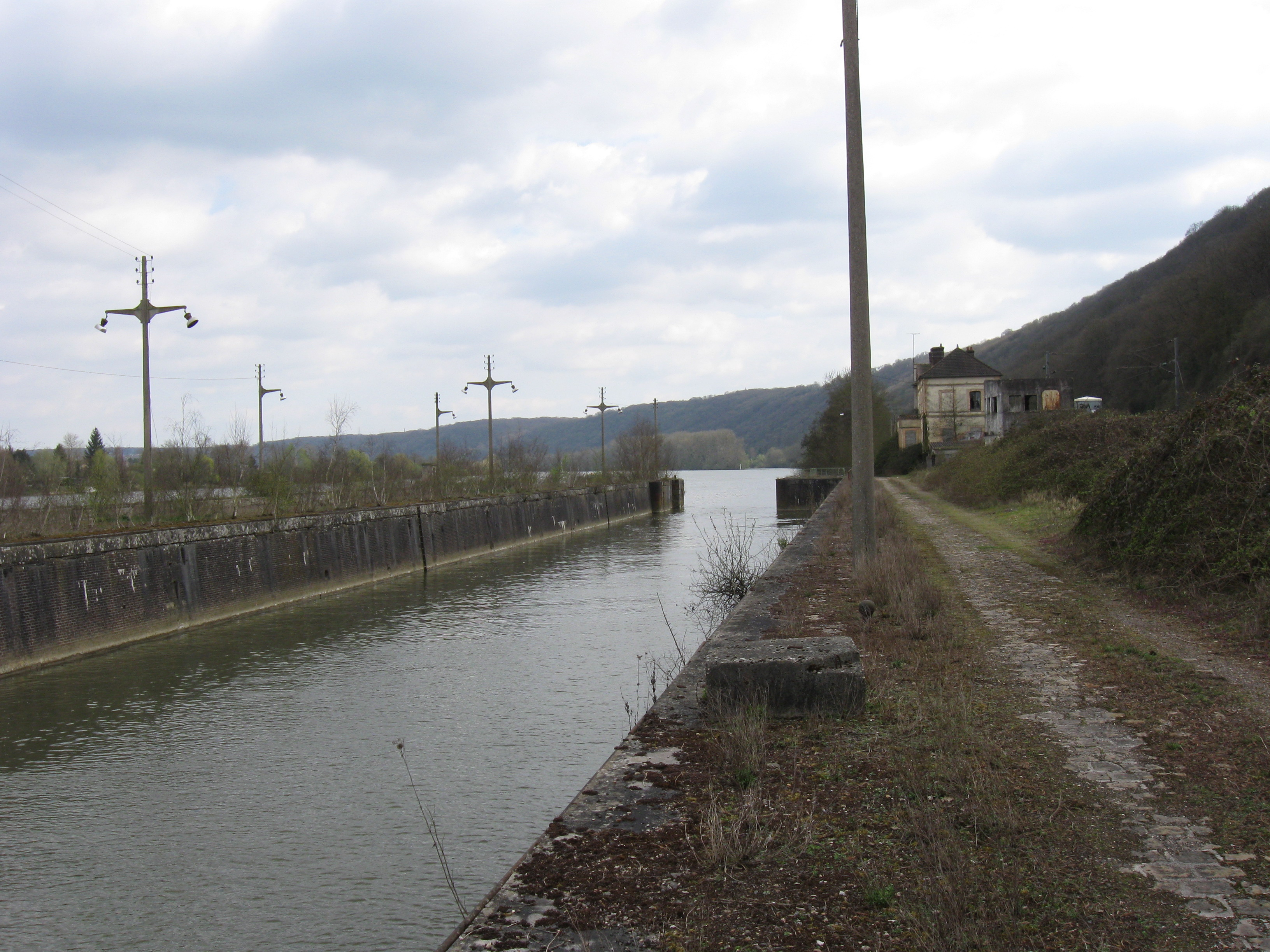 Ancien barrage-écluse de Port-Villez. (Yvelines, région Île-de-France).